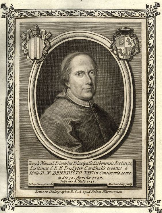 Cardeal-Patriarca José Manuel da Câmara de Atalaia (1686-1758)